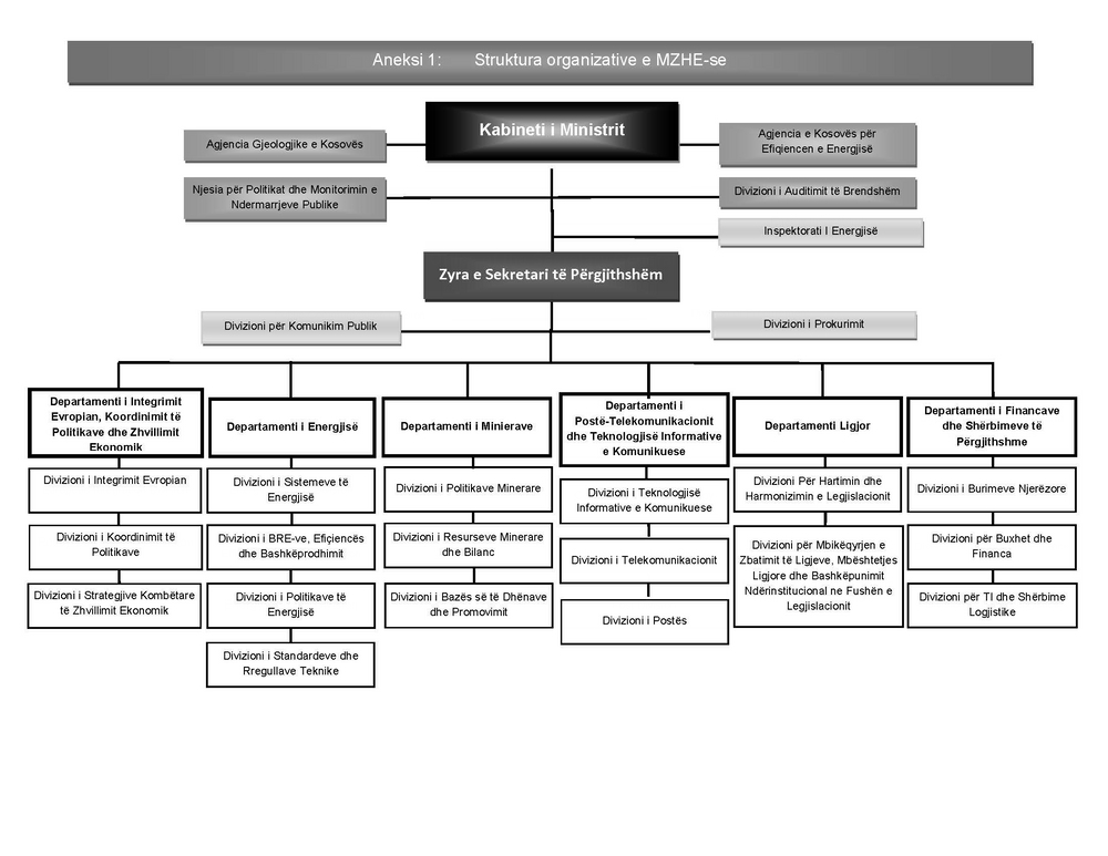 Organogrami i Ministrisë së Zhvillimit Ekonomik